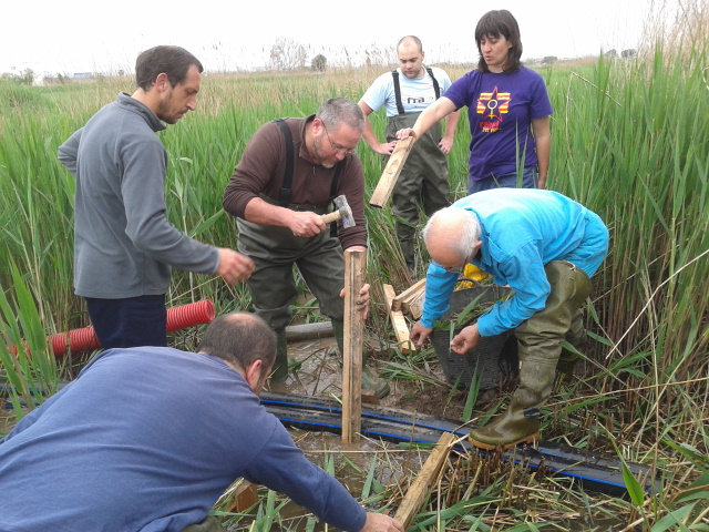 Ecologistes treballant a la Marjal de Rafalell i Vistabella